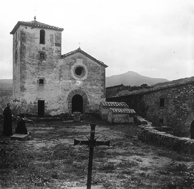 Façana de l'església i cementiri de Valldaneu. Josep Salvany i Blanch (1916)